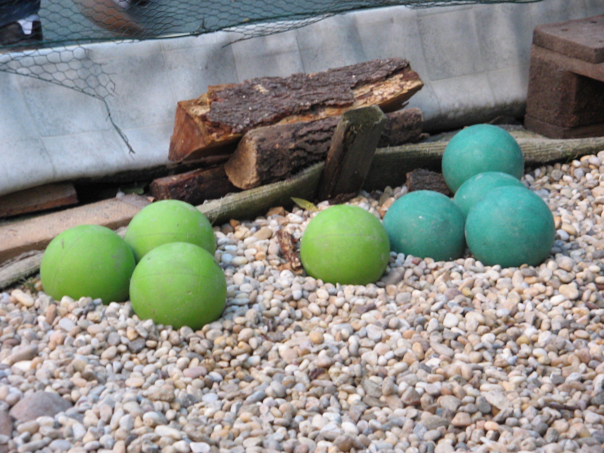 a képen bocsagolyók láthatók termszetesen pályán kívül